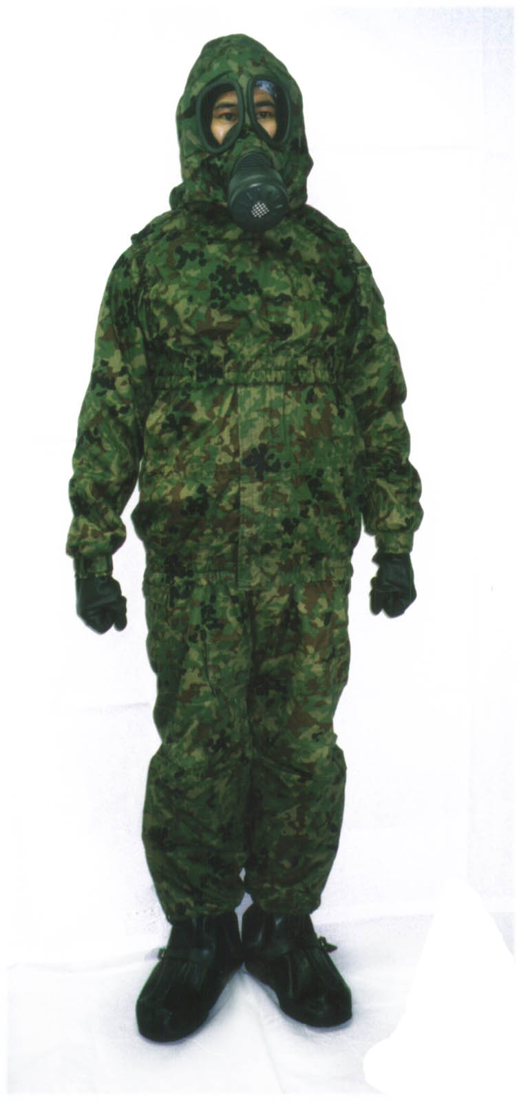 ○ 諸元等 [全備重量]約７．７ｋｇ [開発]防衛省技術研究本部 [製作]東洋紡績、興研 身体を完全に覆い、有毒ガス、液滴及び空気中を浮遊する微粒子状物質から全身を保護するために使用する。